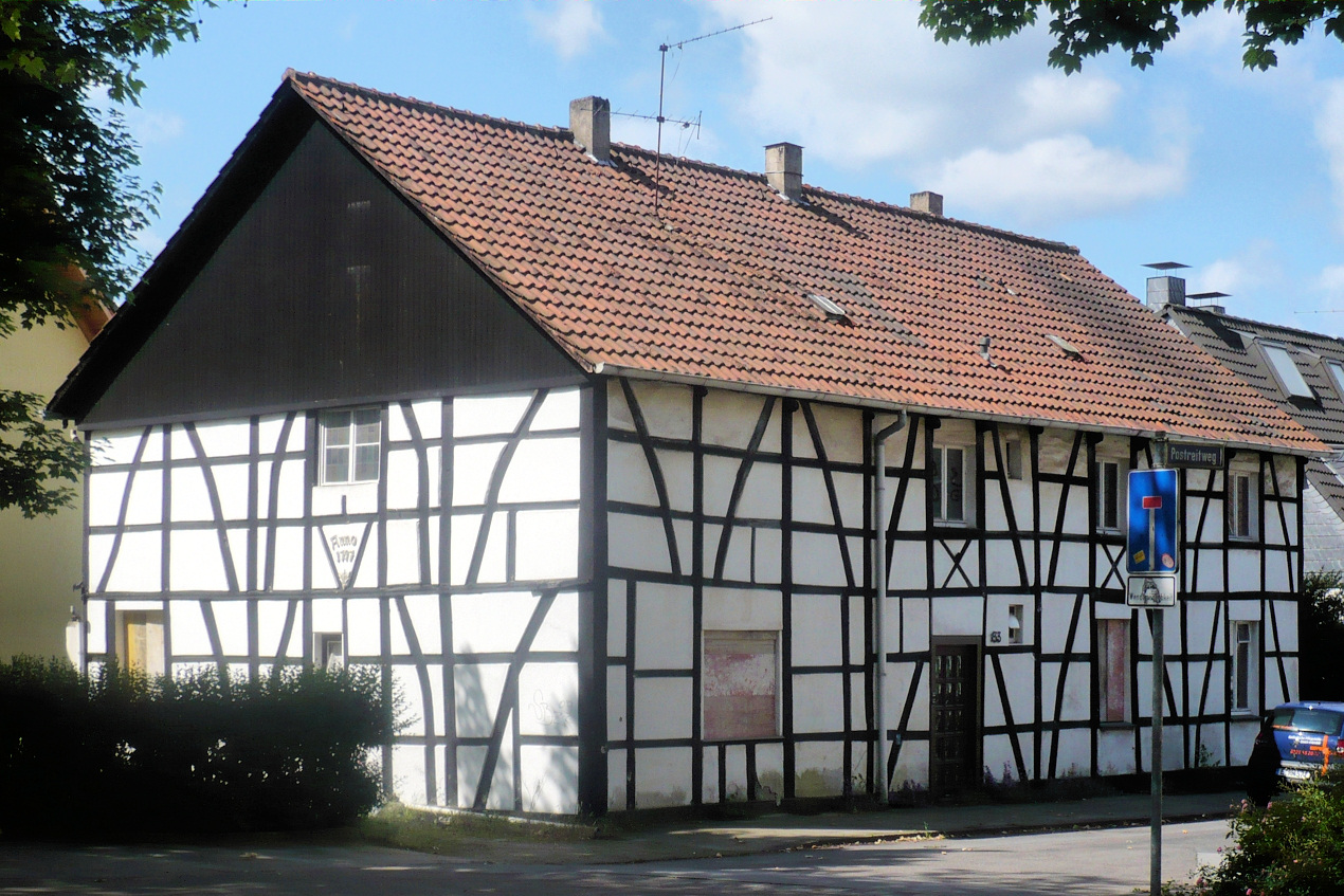 Kotten von Wilh. Distelkamp in unmittelbarer Nähe des ehem. Distelkampshofes im heutigen in Essen-Frohnhausen